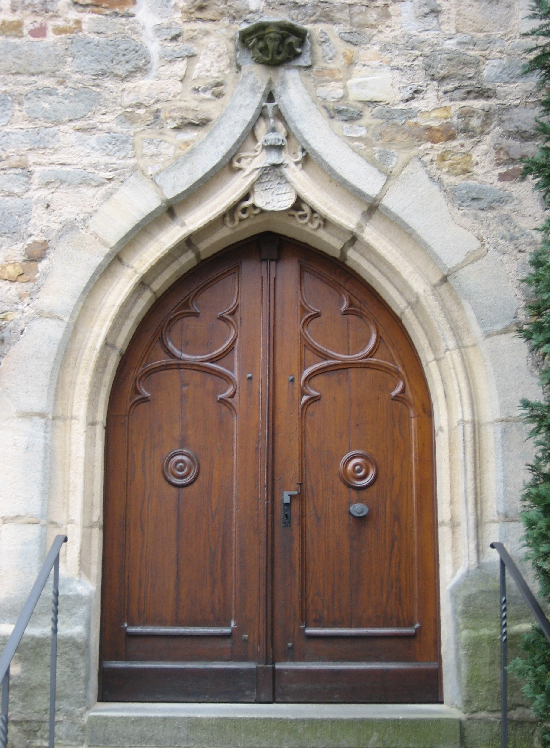 Walddorfhäslach, spätgotisches Portal (um 1500) der evangelischen Pfarrkirche Walddorf